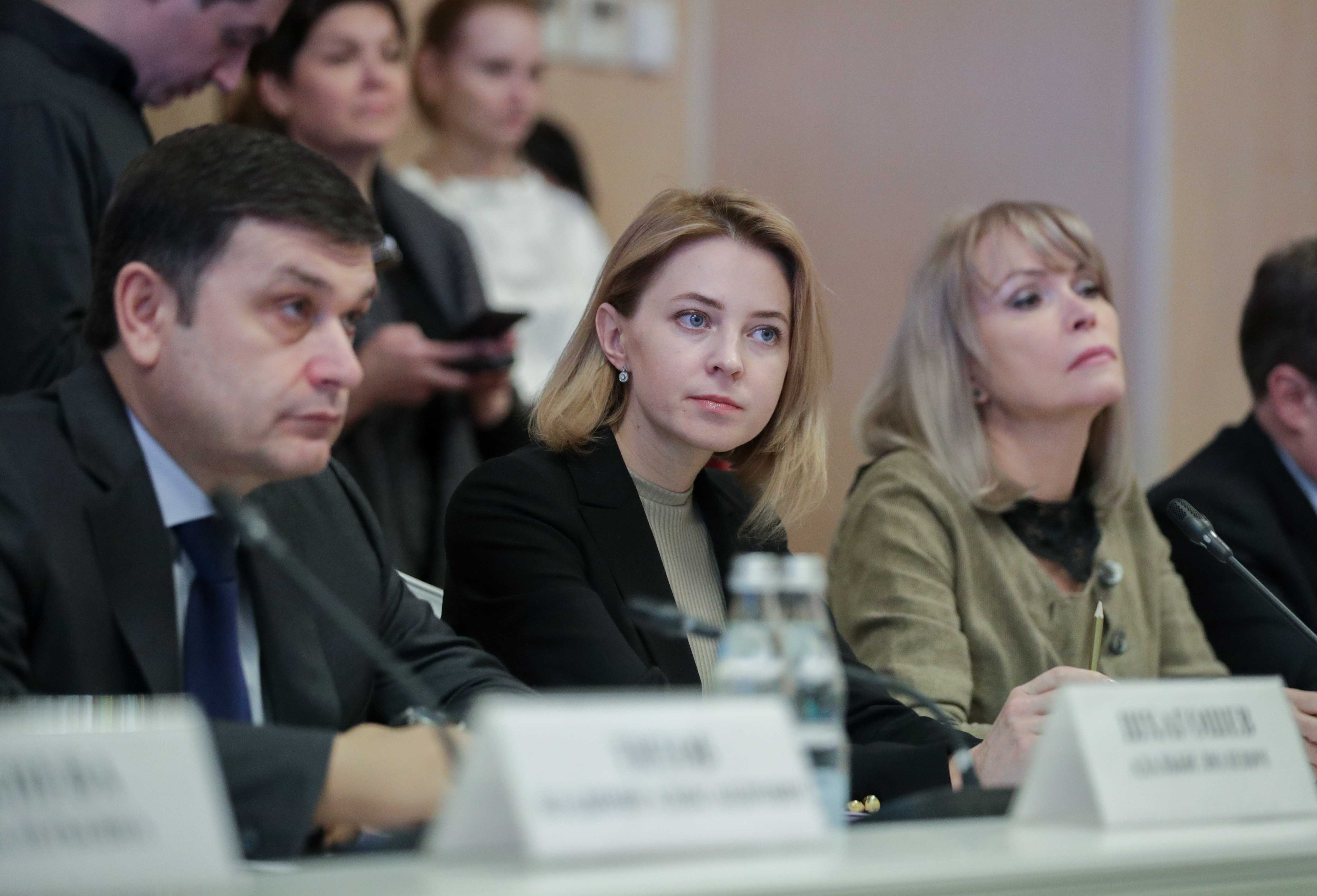 Член Комитета по безопасности и противодействию коррупции Адальби Шхагошев, заместитель председателя Комитета по международным делам Наталья Поклонская, член Комитета по государственному строительству и законодательству Ирина Белых. Заседание Комиссии Госдумы по расследованию фактов вмешательства иностранных государств во внутренние дела России